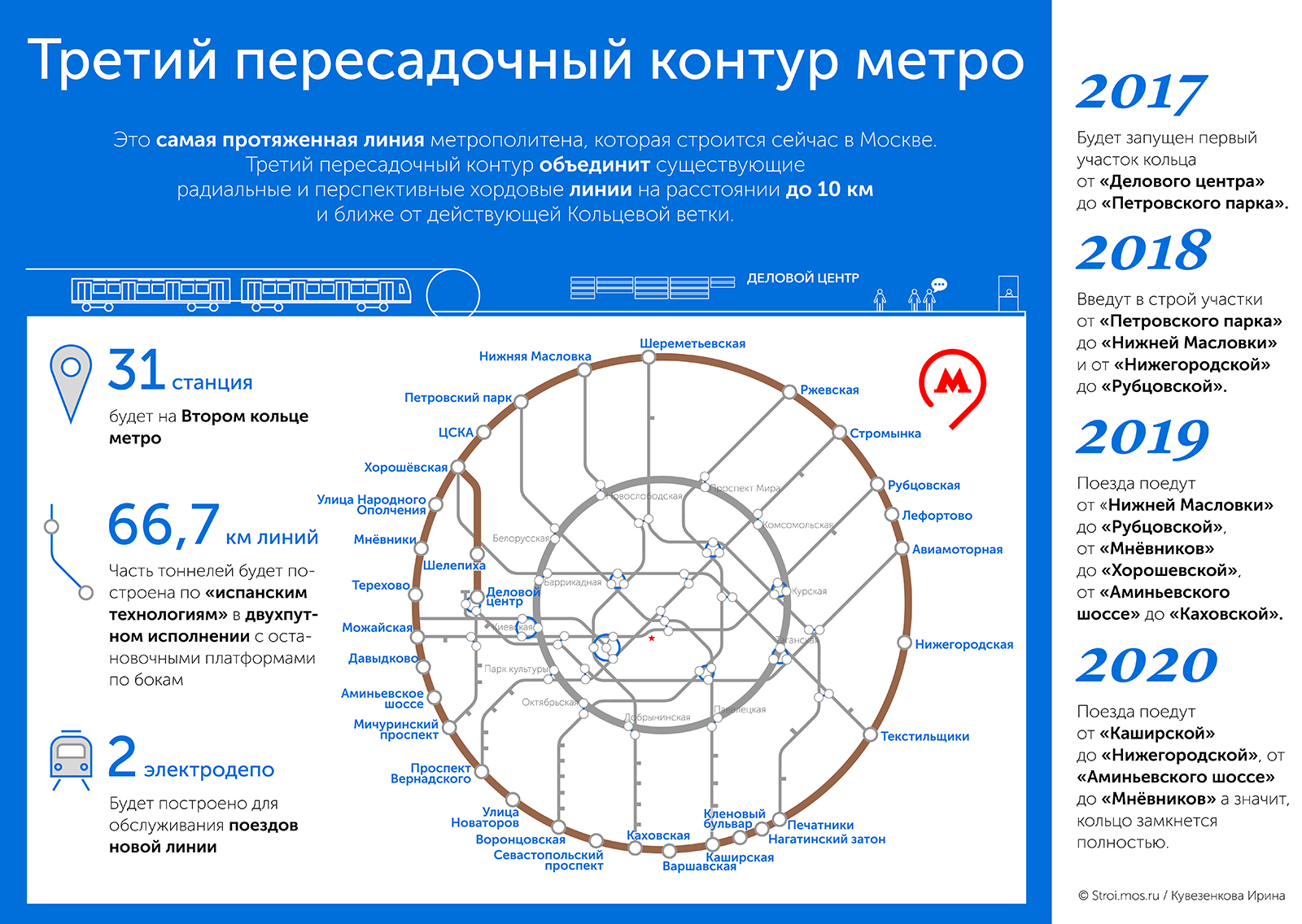 Третий пересадочный контур метро, карта